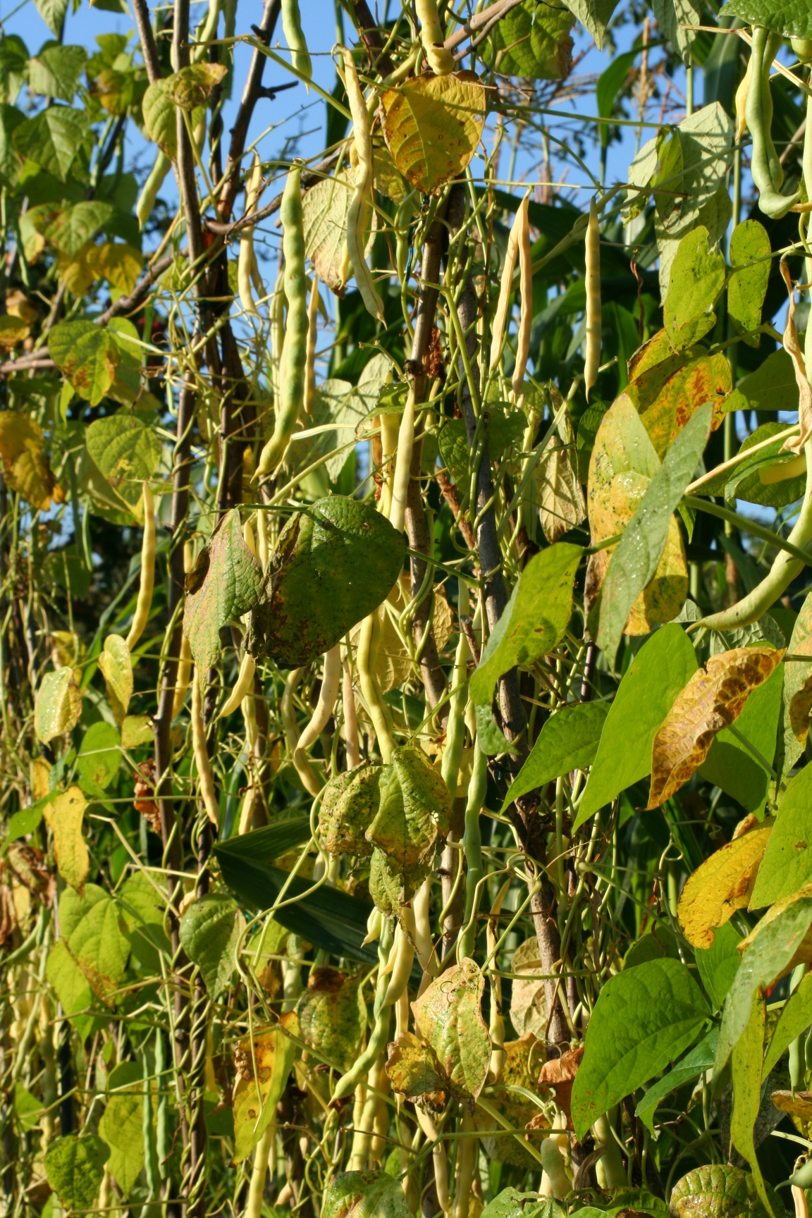 Haricots grimpants variété phénomène (Phaseolus vulgaris)